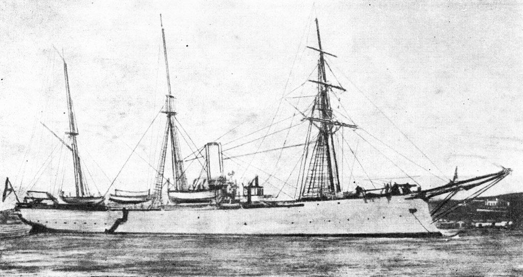 Канонерская лодка «Запорожец».